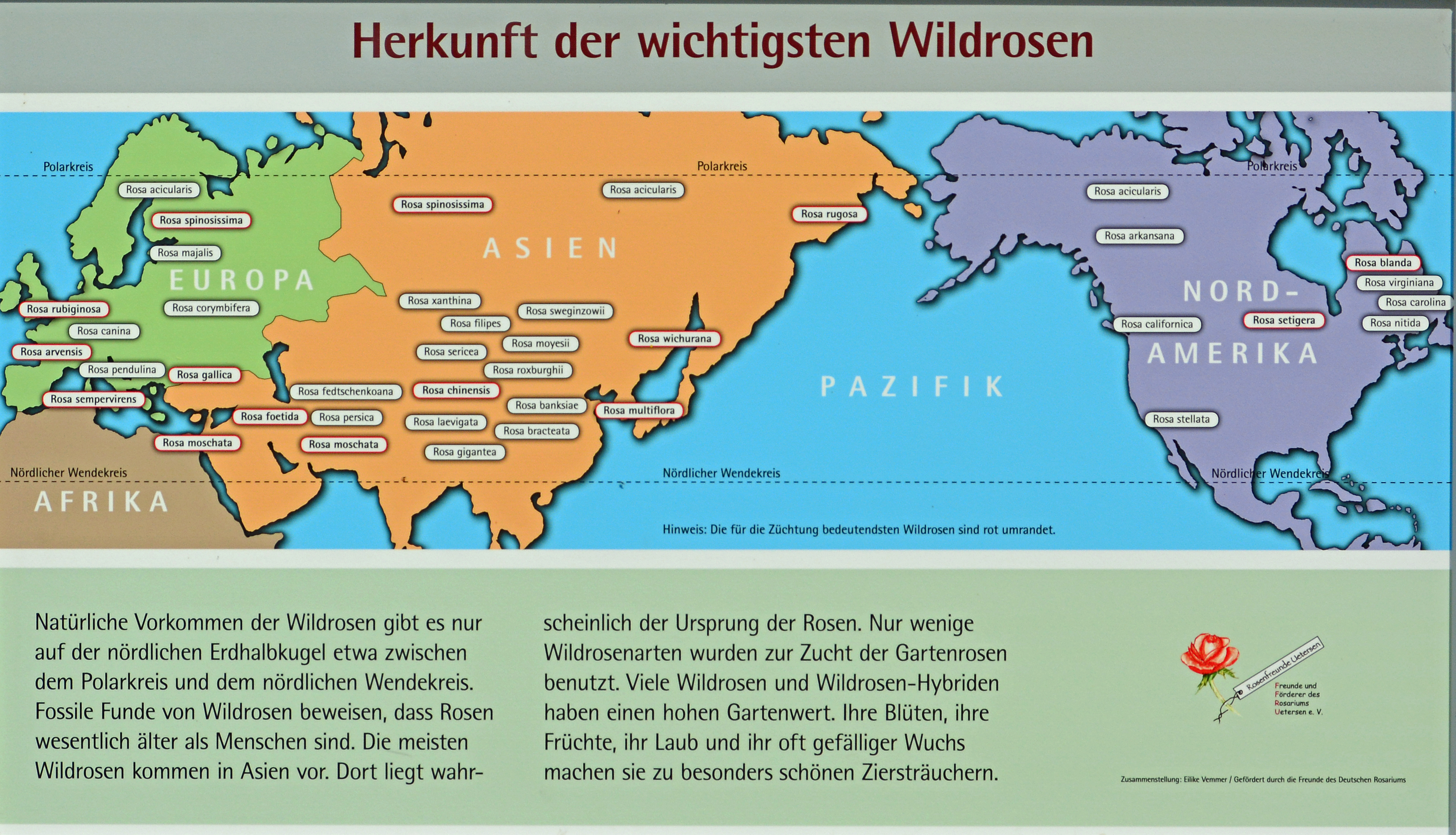 Infoschild Herkunft der wichtigsten Wildrosen im Rosarium Uetersen